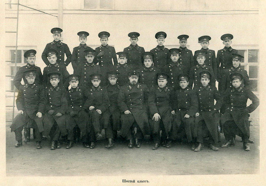 Нижегородский дворянский институт Императора Александра II. 1913 уч. г. Шестой класс.